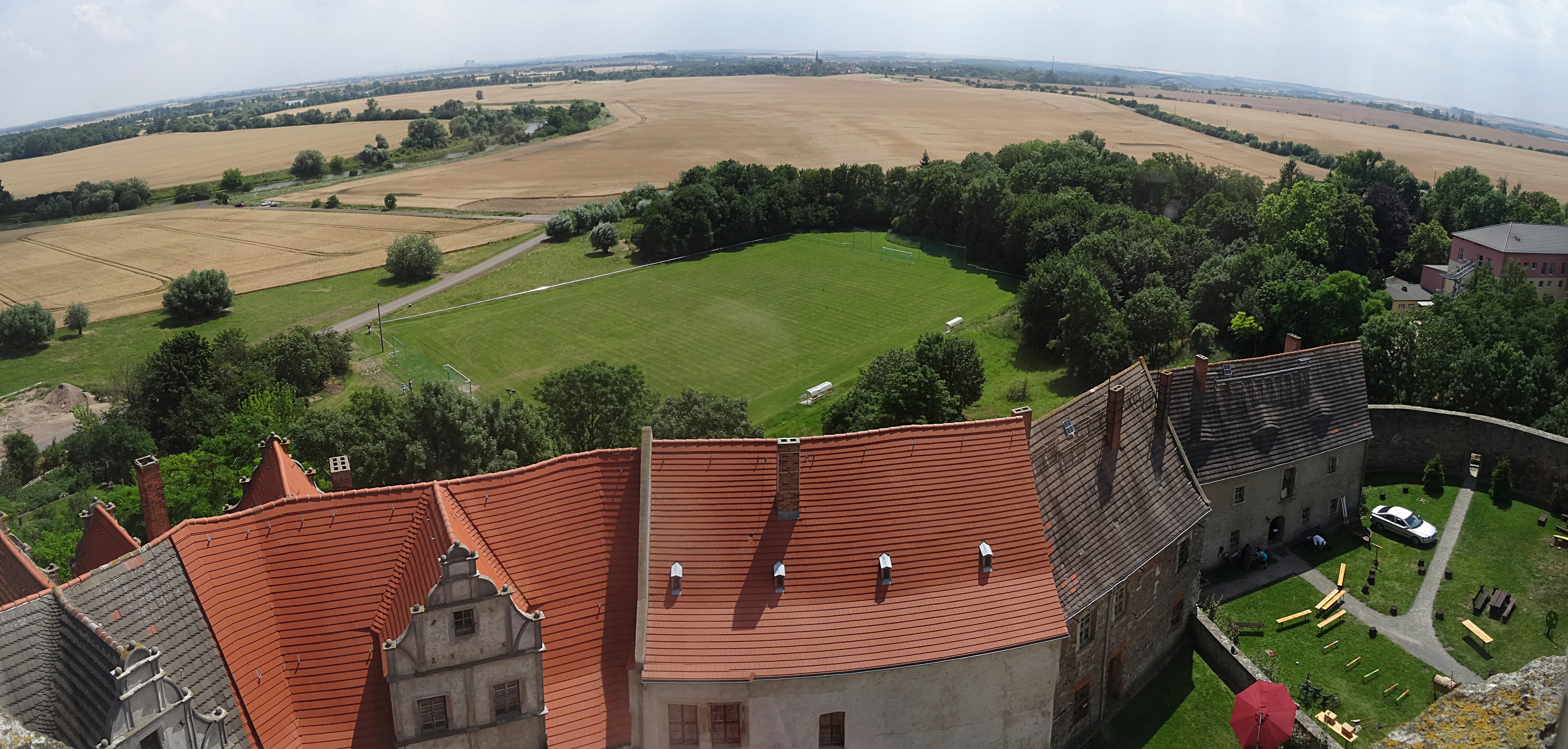 Panorama Aussicht vom Schlossturm nach Süden